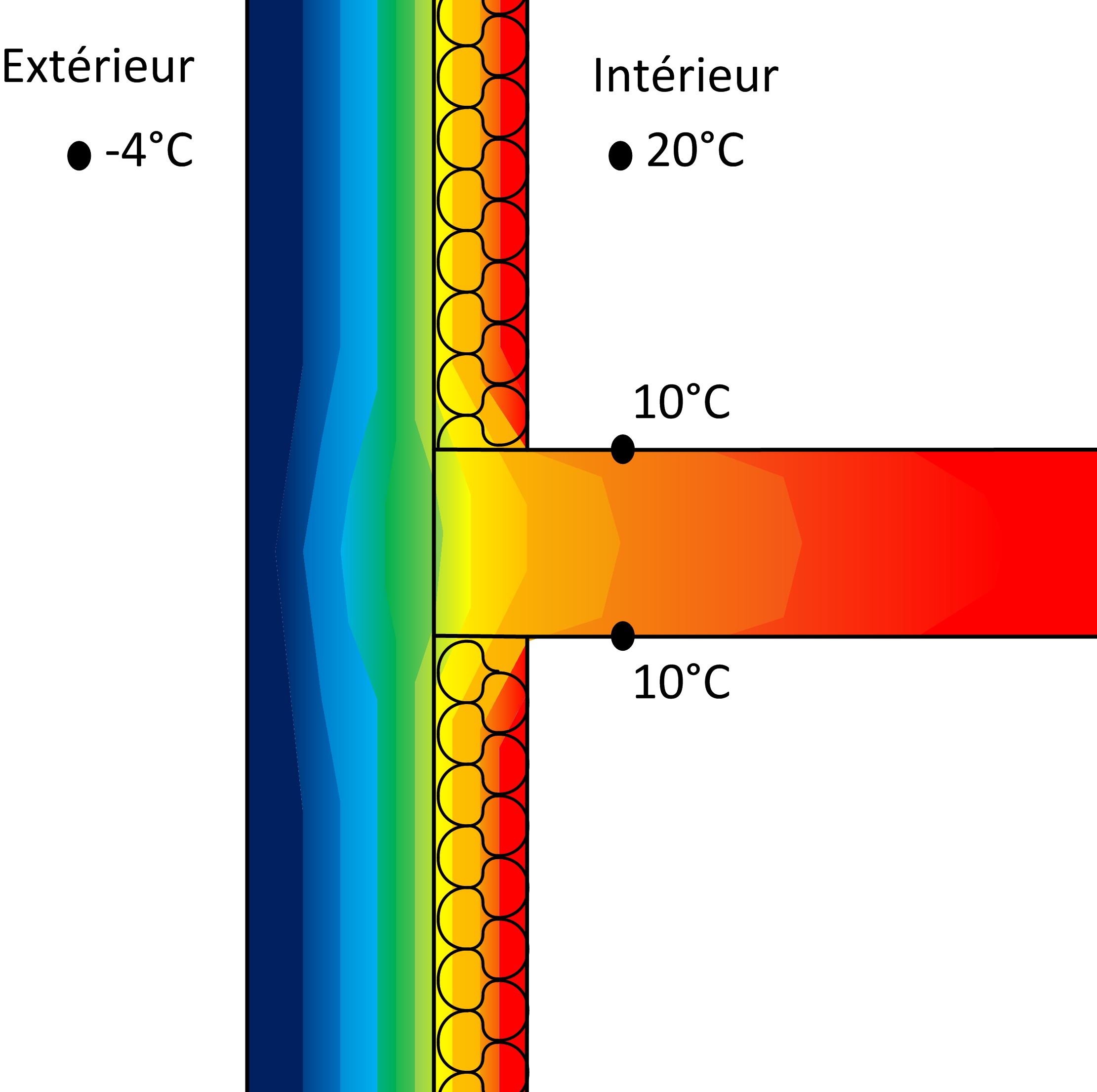 1.5- différence de temperature sans rupteur